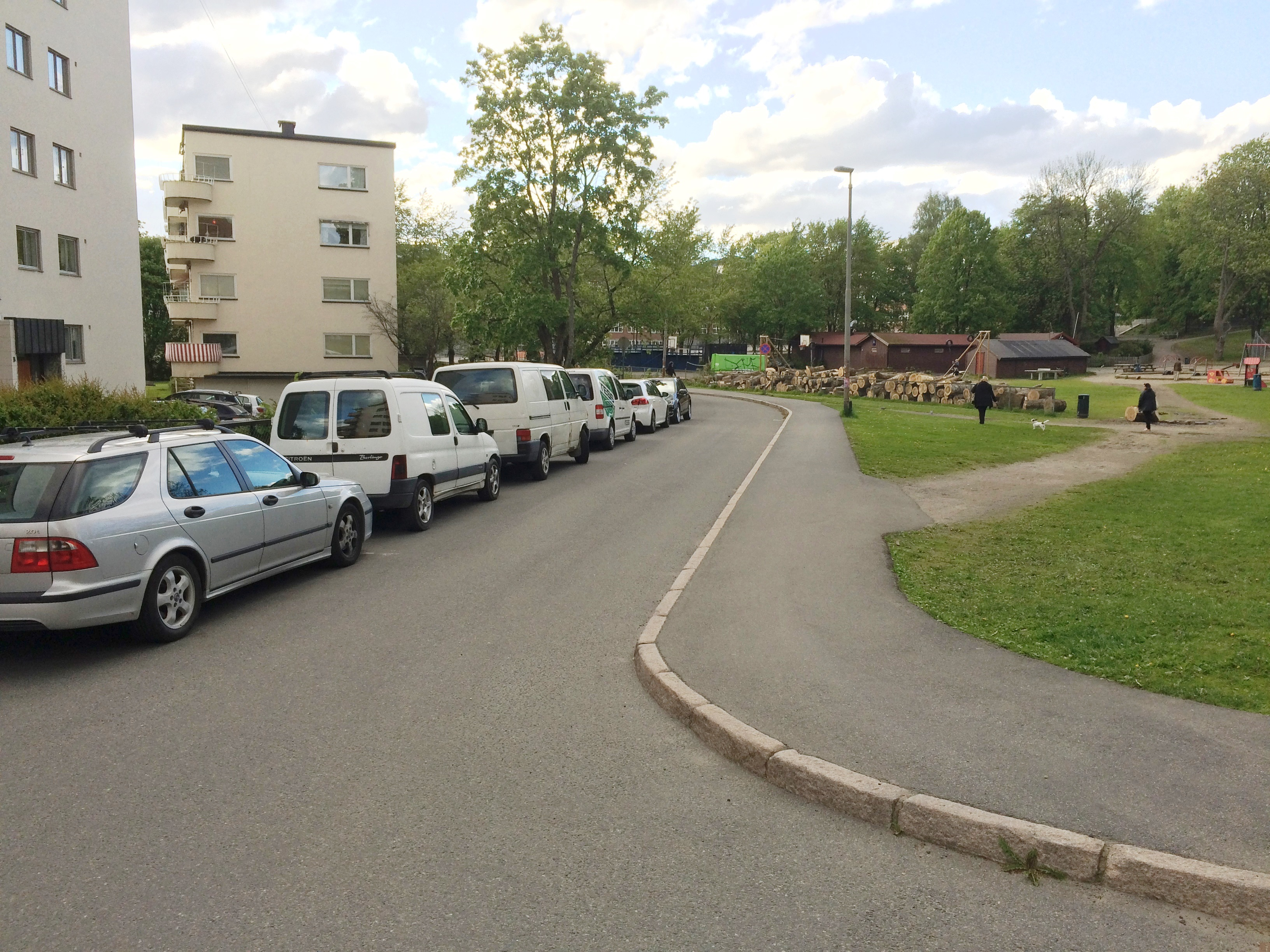 Tusentrippen på Marienlyst